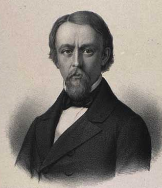 Dansk militærmusiker og komponist (1819-1859) Danish military musician and composer